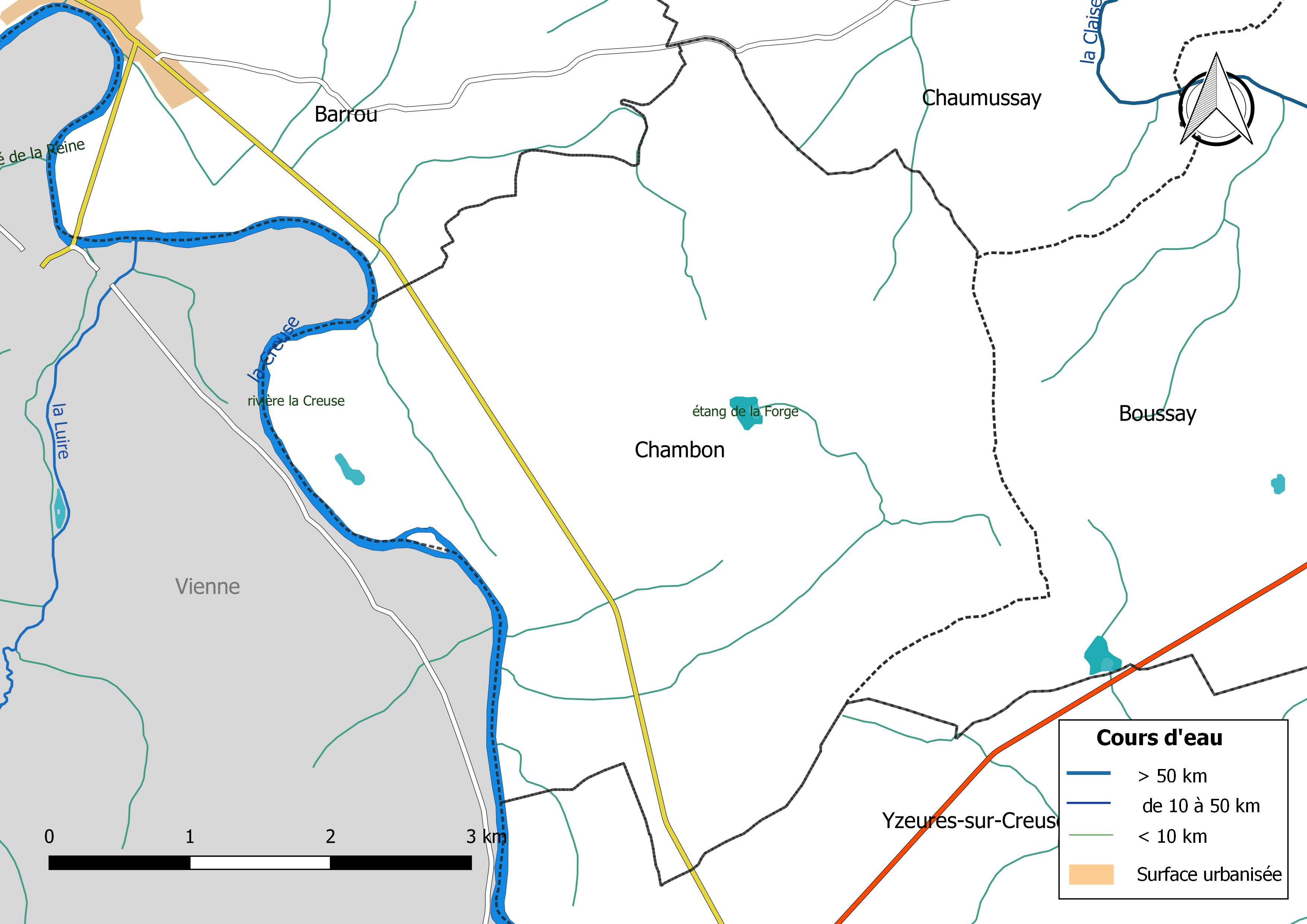 Carte du réseau hydrographique de la commune de Chambon (Indre-et-Loire) (France).